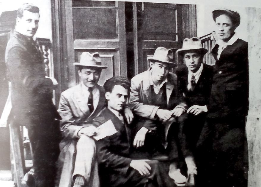 Беларуская (тарашкевіца): Зьлева направа: Аркадзь Мардвілка, Зьмітрок Астапенка, Віктар Казлоўскі, Юлі Таўбін, Валеры Маракоў, Станіслаў Шушкевіч